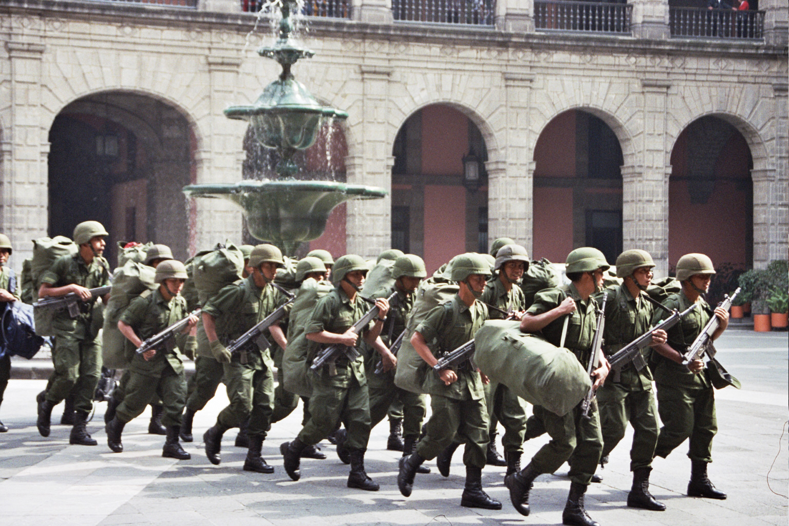 Cambio de guardia